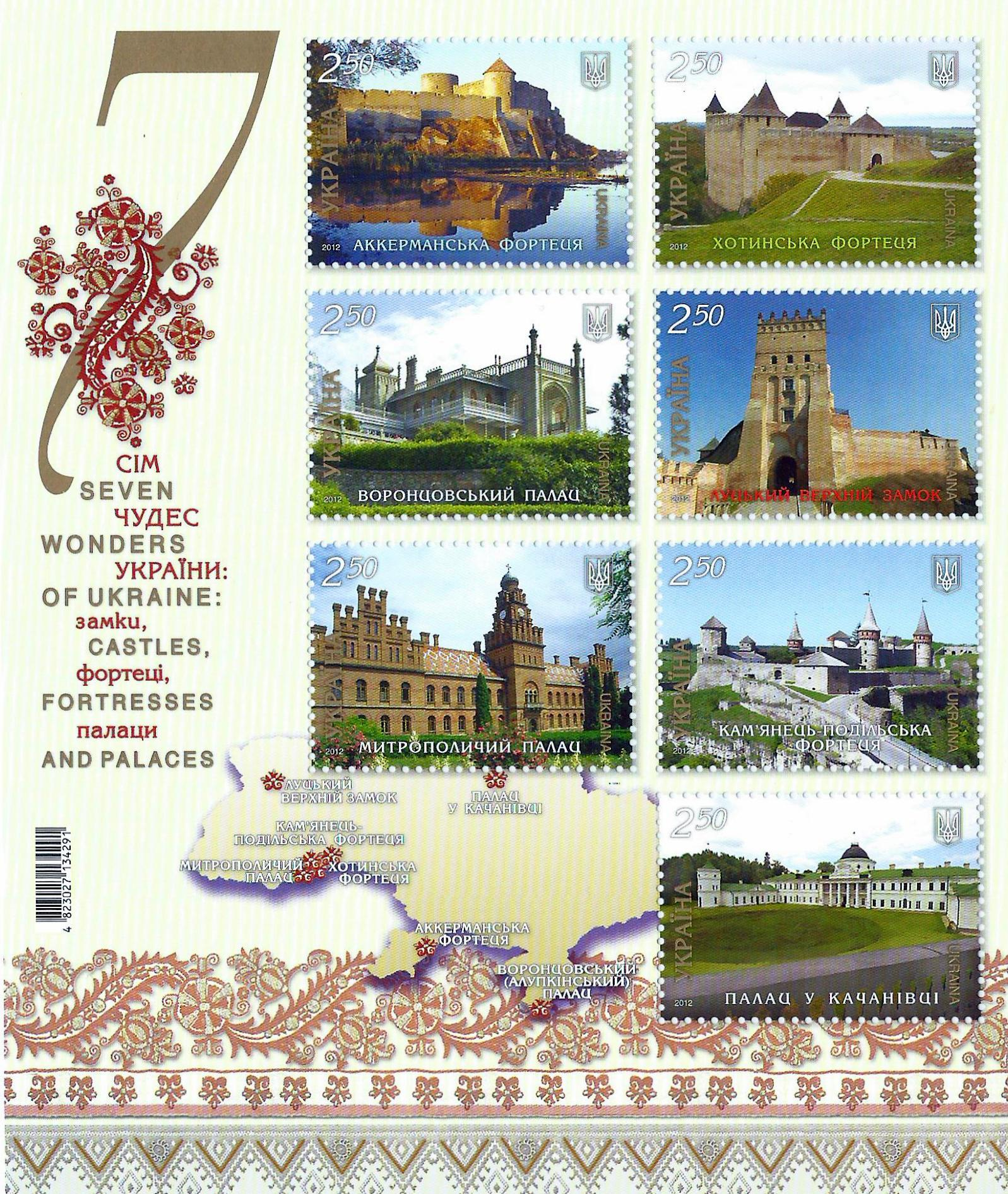 Série de timbres ukrainiens (2012) présentant les "Sept Merveilles d'Ukraine" (châteaux, forteresses, palais)